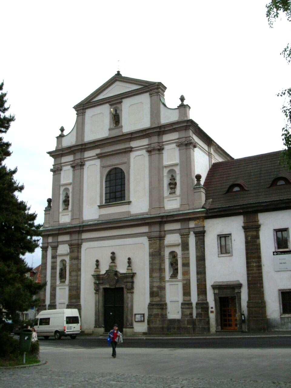 Ceska_Lipa_Monastery